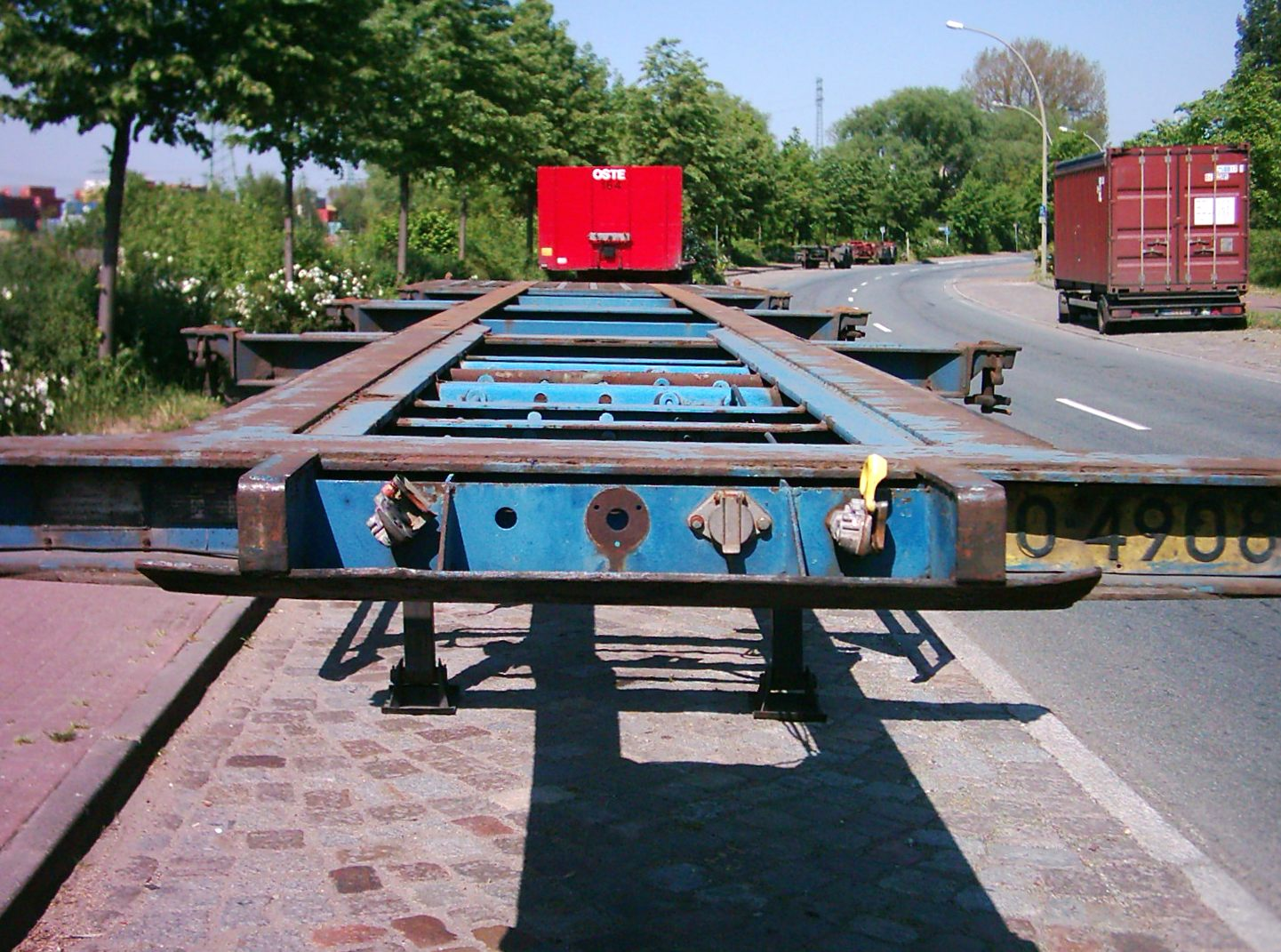 Anschlüsse der Bremsanlage an einem Sattelauflieger.